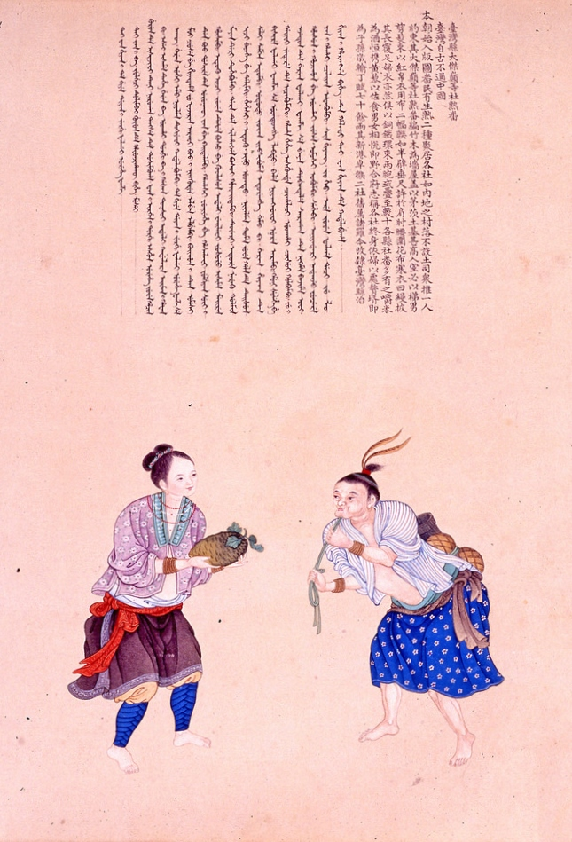 中文（香港）: 清 謝遂 職貢圖